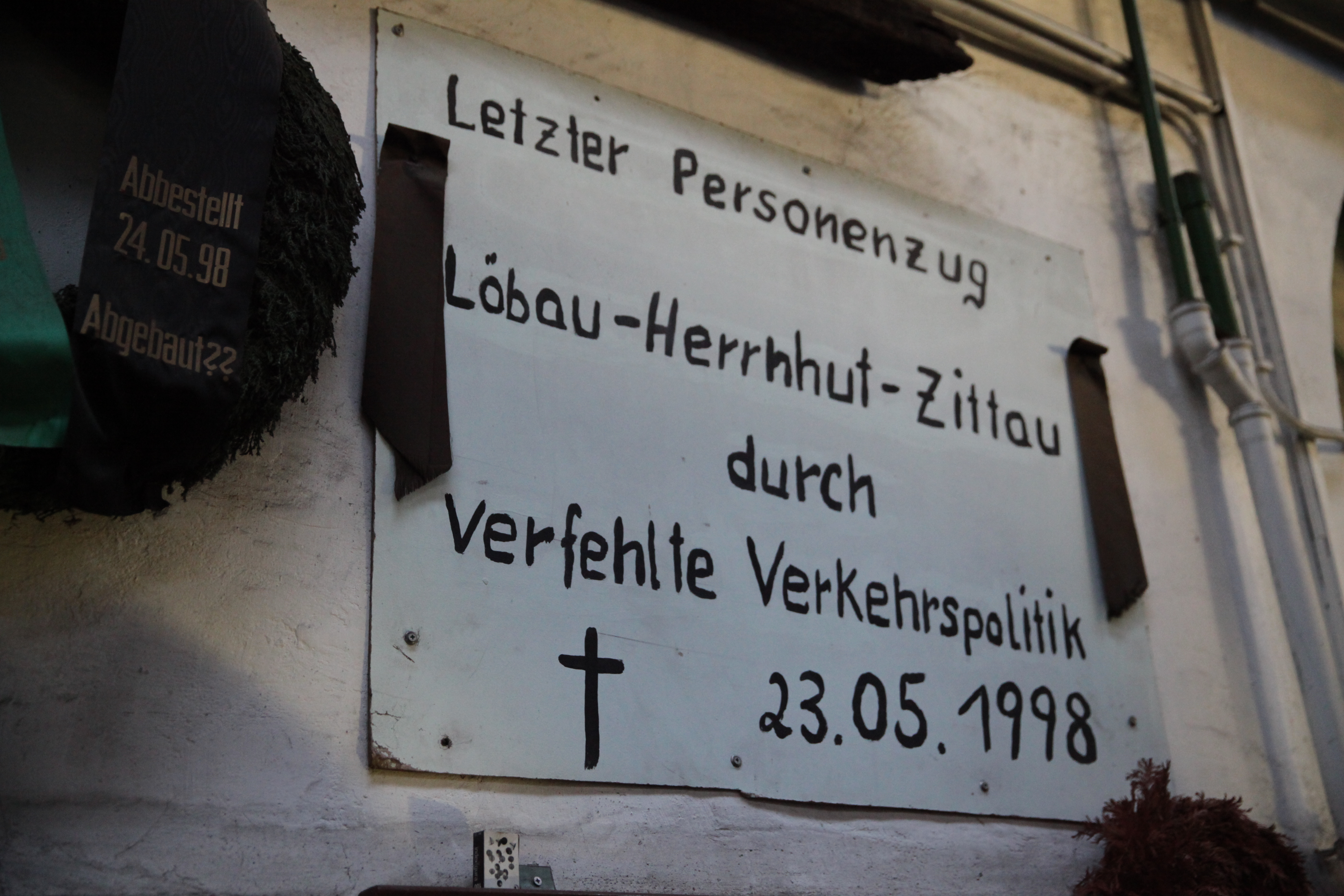 Gedenktafel im Lokbahnhof Löbau (Sachsen) anlässlich des letzten Personenzuges Löbau – Herrnhut – Zittau am 23. Mai 1998